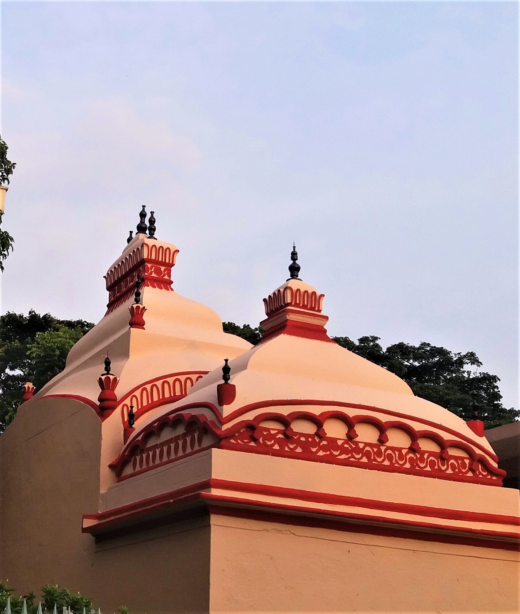 ঢাকেশ্বরী মন্দির The oldest portion of existing structure